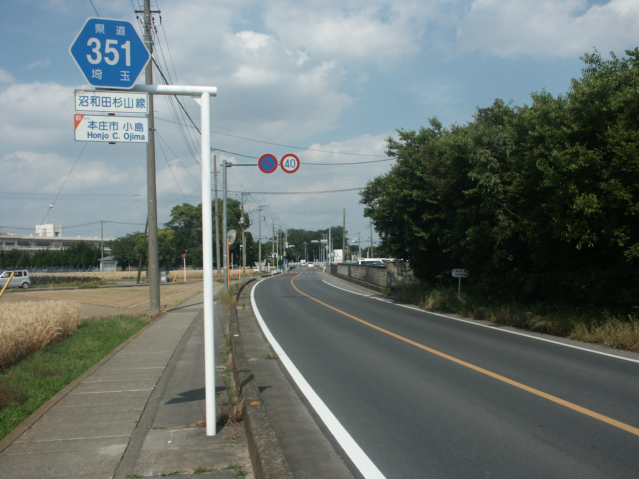 埼玉県道３５１号線本庄市小島付近